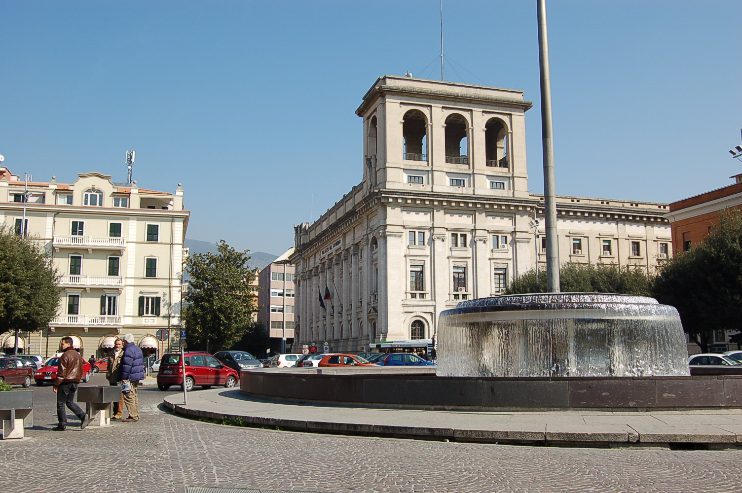 Piazza Tacito (Terni)